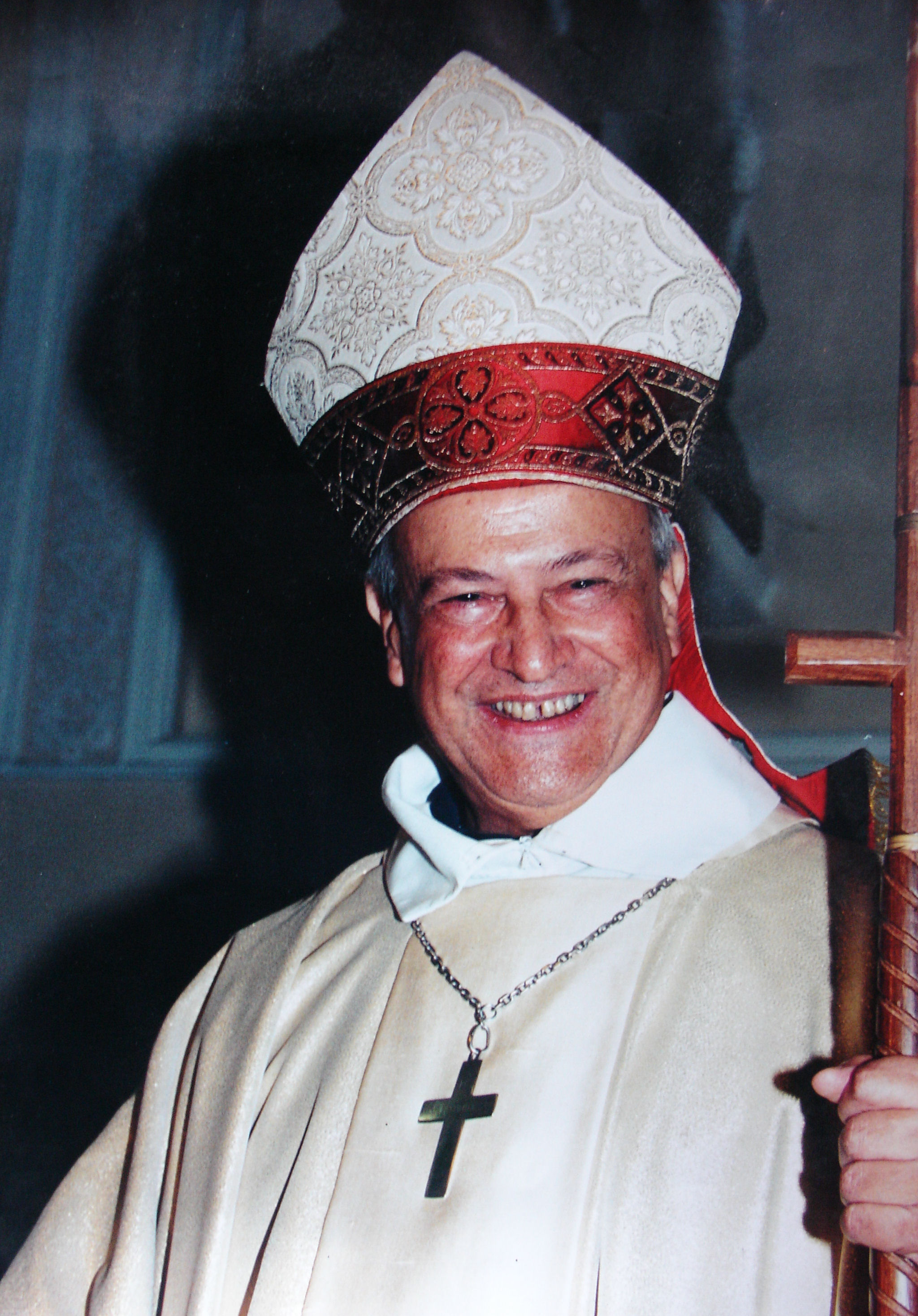 Mons. Daniel Gil Zorrilla, obispo de Salto, Uruguay